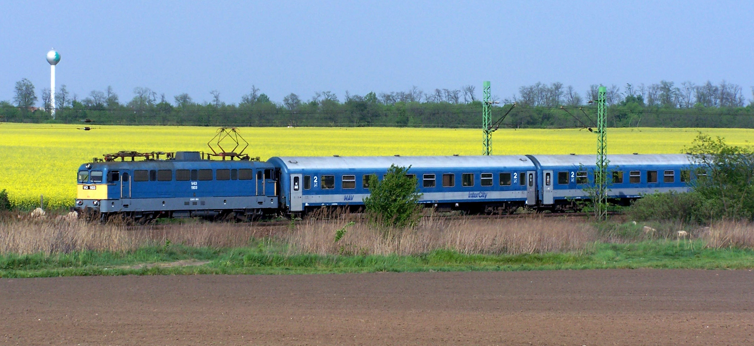 A MÁV V43 sorozatú villamosmozdonya InterCity vonattal egy repcetábla előtt Maglód határában.